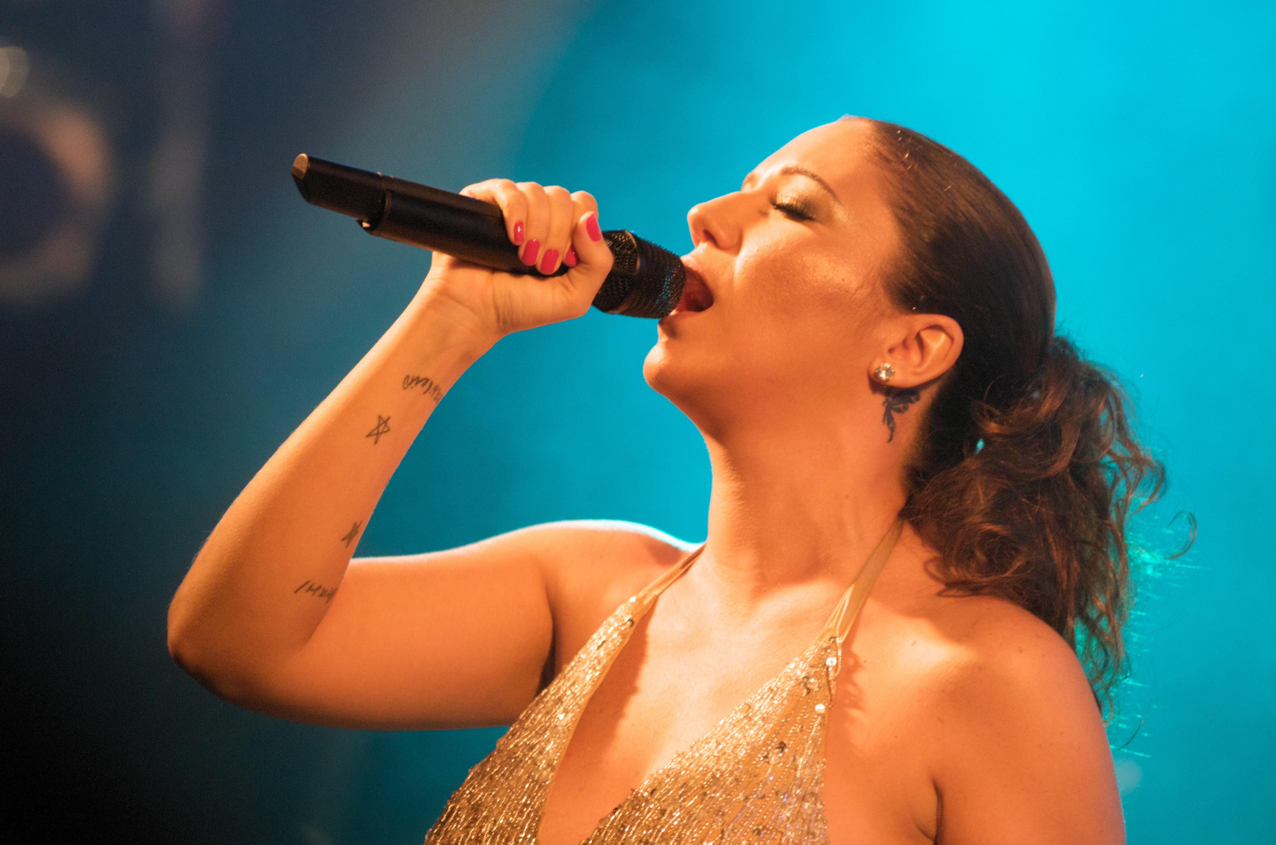 Maria Rita na Virada Cultural 2009.